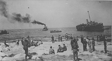 אוניית המעפילים חיים ארלוזורוב